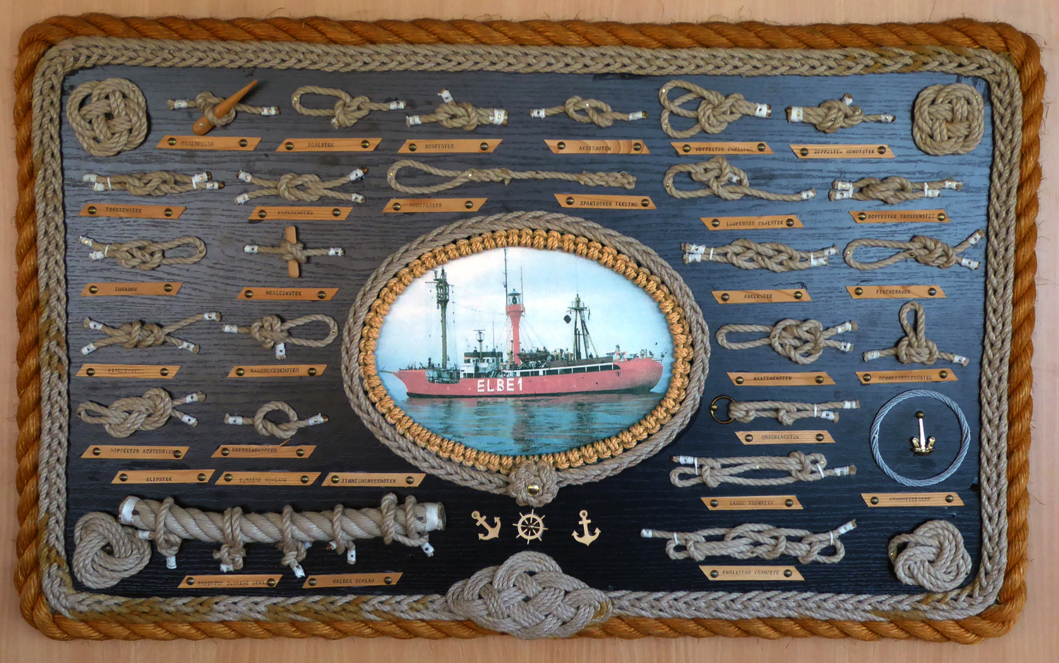 En tavla med diverse knopar på en vägg på fyrskeppet Elbe 1.